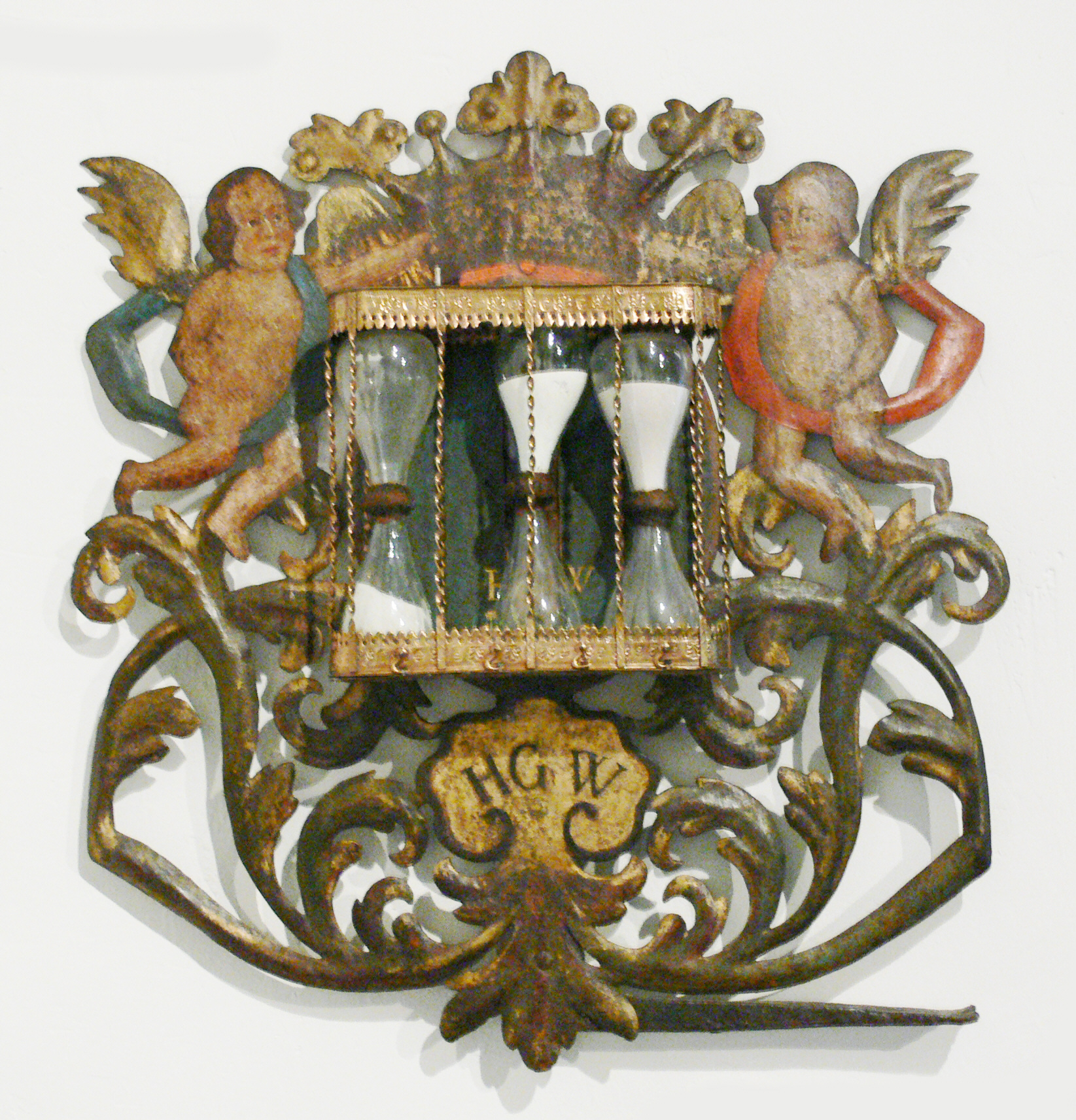 Kanzeluhr von 1776, signiert "HGW". Die an der Kanzel angebrachte Uhr diente dem Pfarrer zur Einhaltung der Predigtzeiten. Museum für Thüringer Volkskunde, Erfurt.